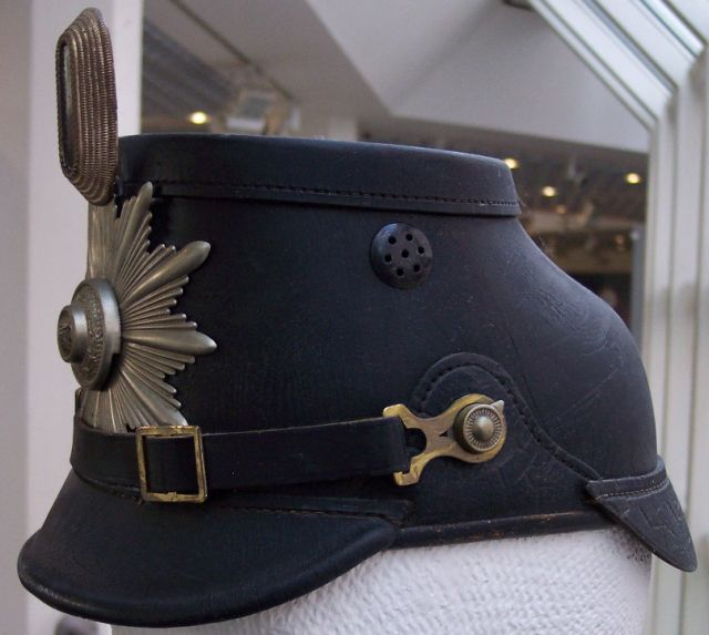 Preussischer Tschako